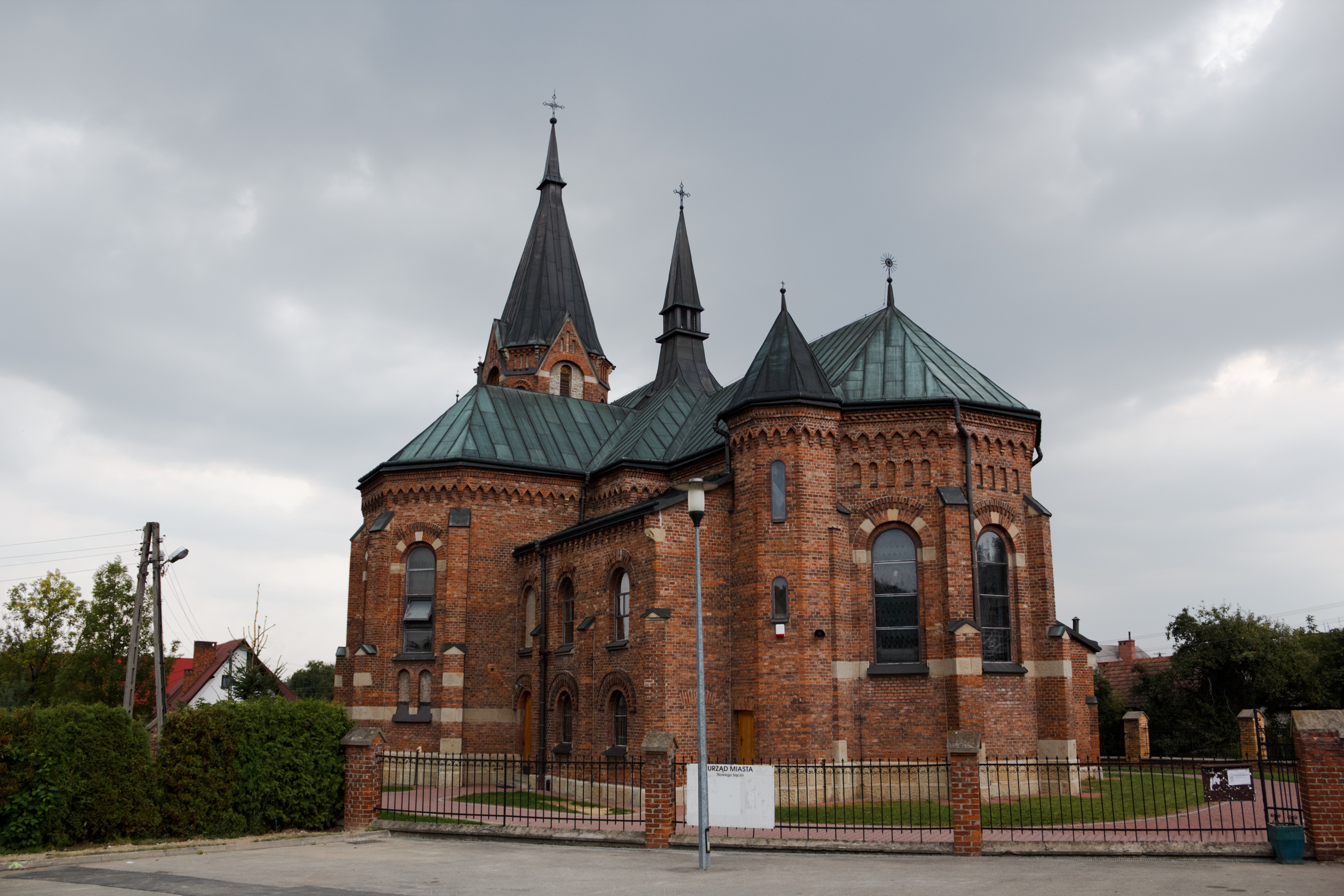 Kościół p.w. św. Wawrzyńca Łazy Biegonickie, Stary Sącz